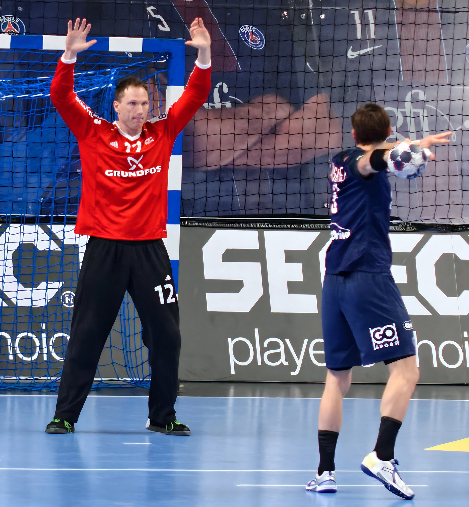 Rencontre de phase de groupe de la ligue des champions 2016-17 entre le PSG et Bjerringbro-Silkeborg. A Coubertin, le 11 février 2017.